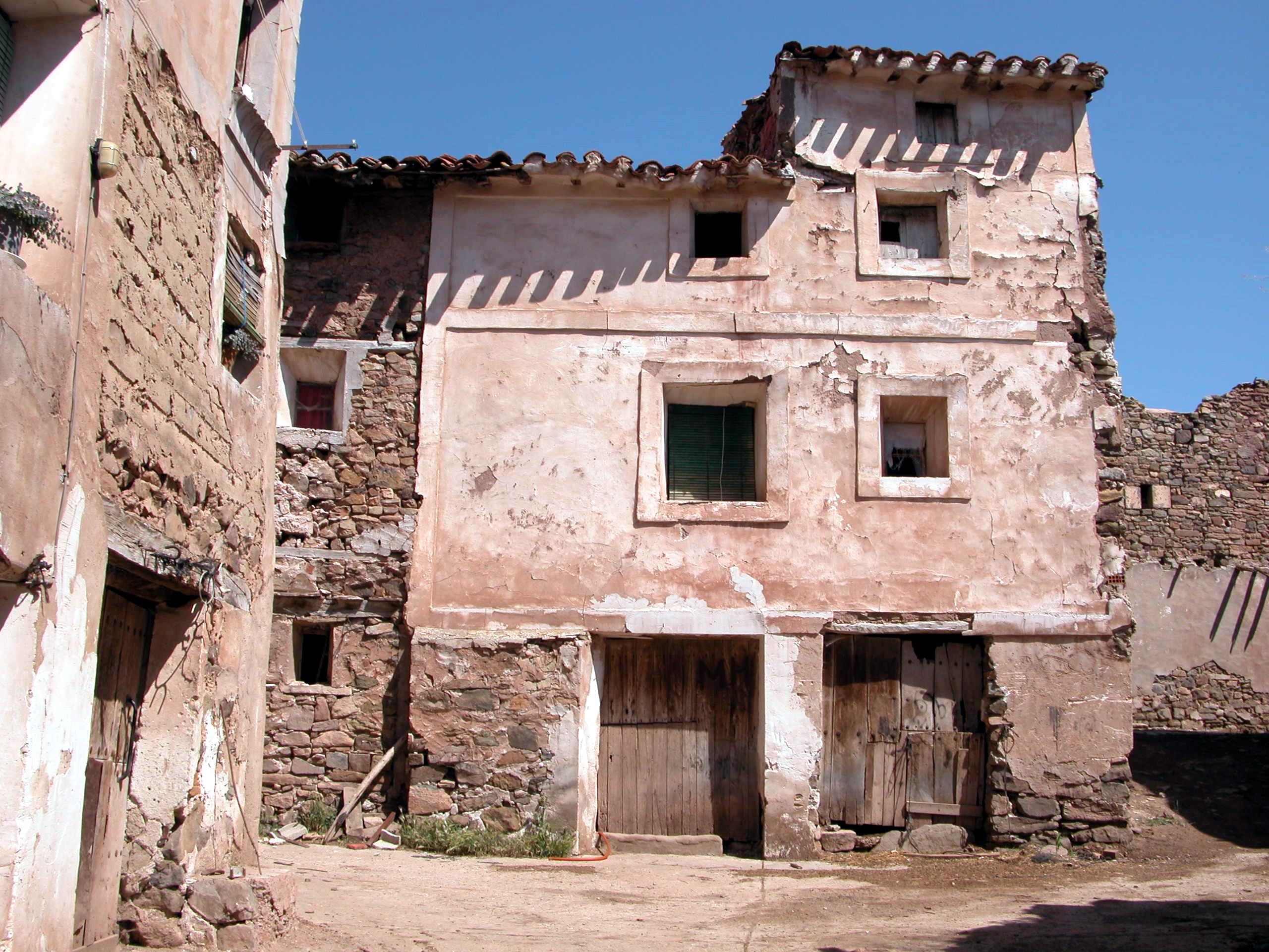 Santa Cecilia, aldea de Santa Engracia del Jubera en La Rioja, (España).